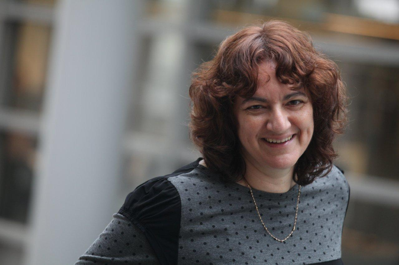 גית עטיה היא מדענית ישראלית בתחום מדעי המחשב. היא פרופסור מן המניין בפקולטה למדעי המחשב בטכניון.